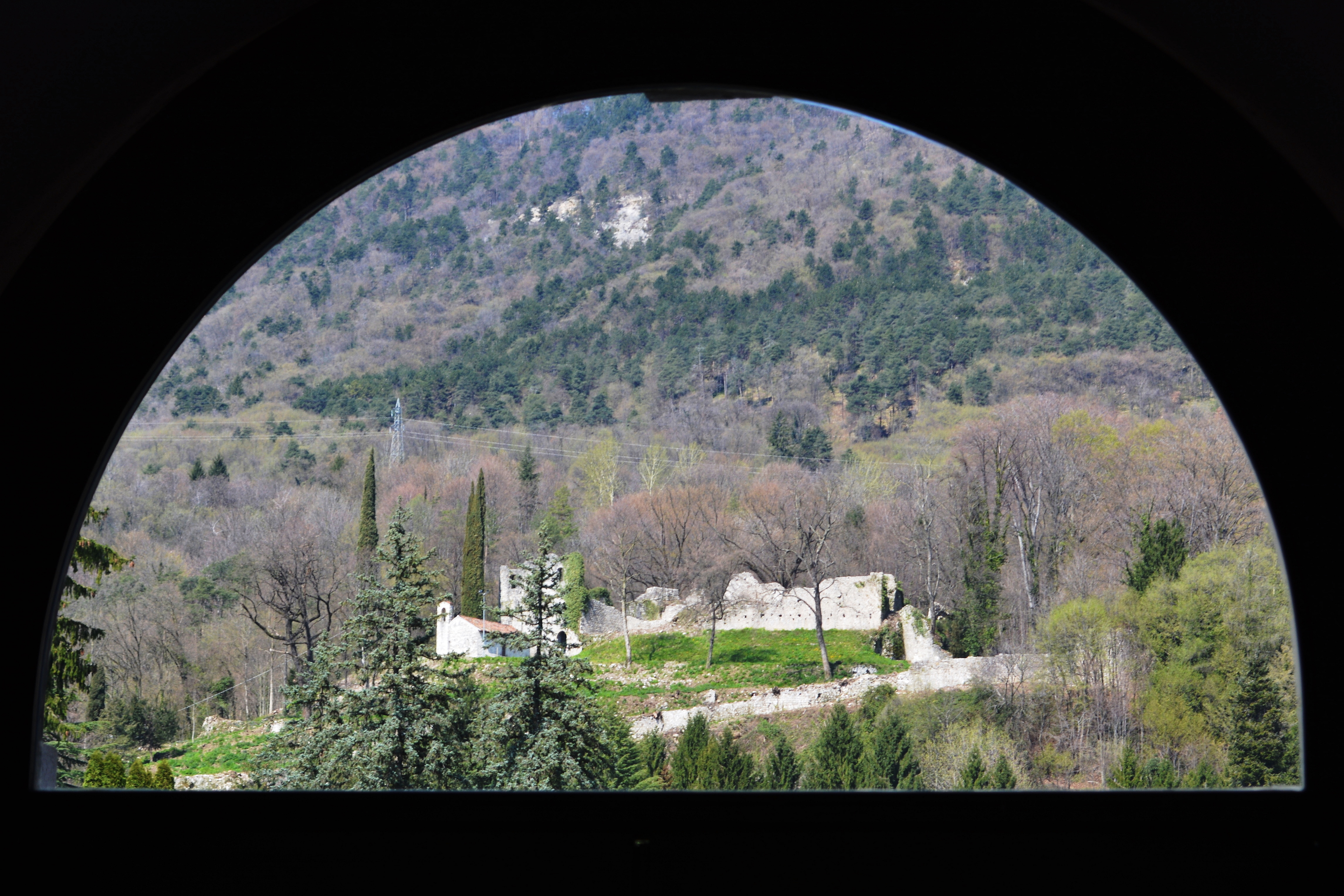 Ruderi del Castello This is a photo of a monument which is part of cultural heritage of Italy.